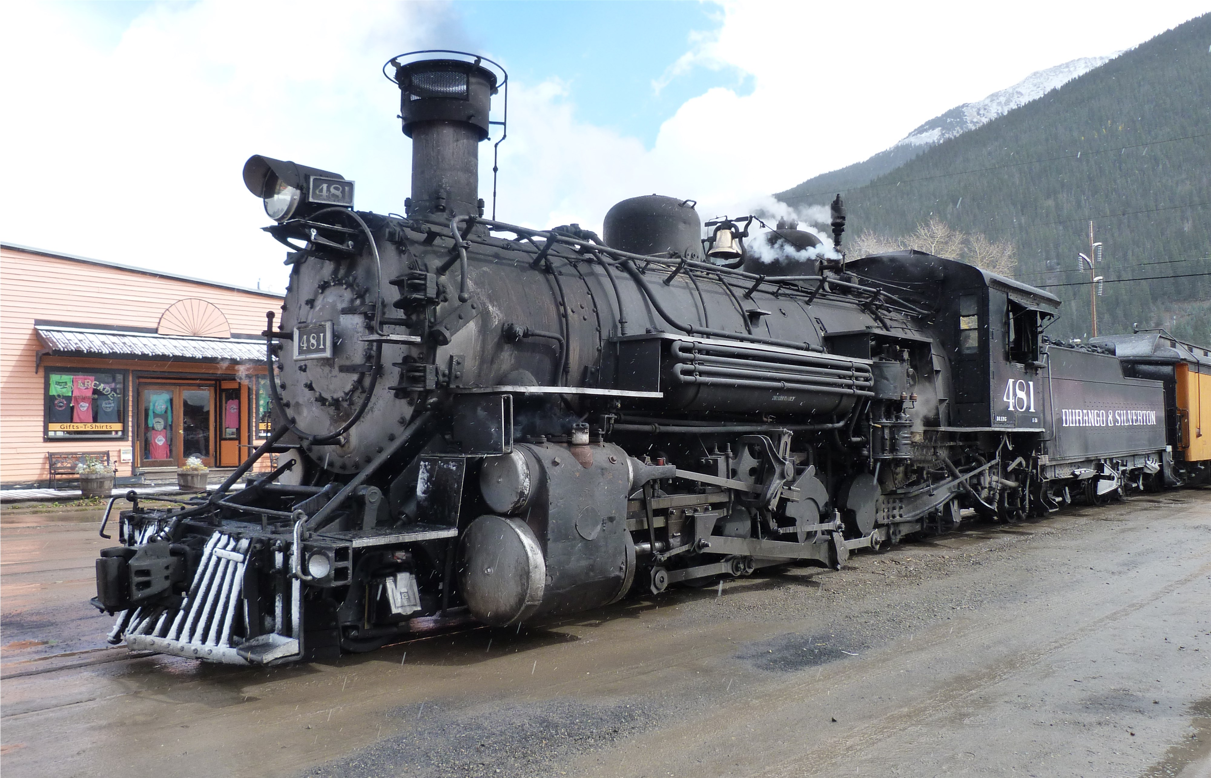 Locomotive à vapeur 481 en gare de Silverton, Colorado, Etats-Unis.